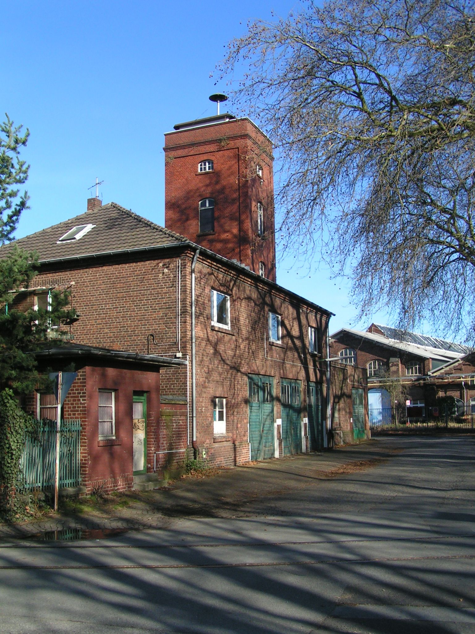 Gebäude der Werksfeuerwehr des ehemaligen Ausbesserungswerks Opladen, Leverkusen-Opladen, Deutschland